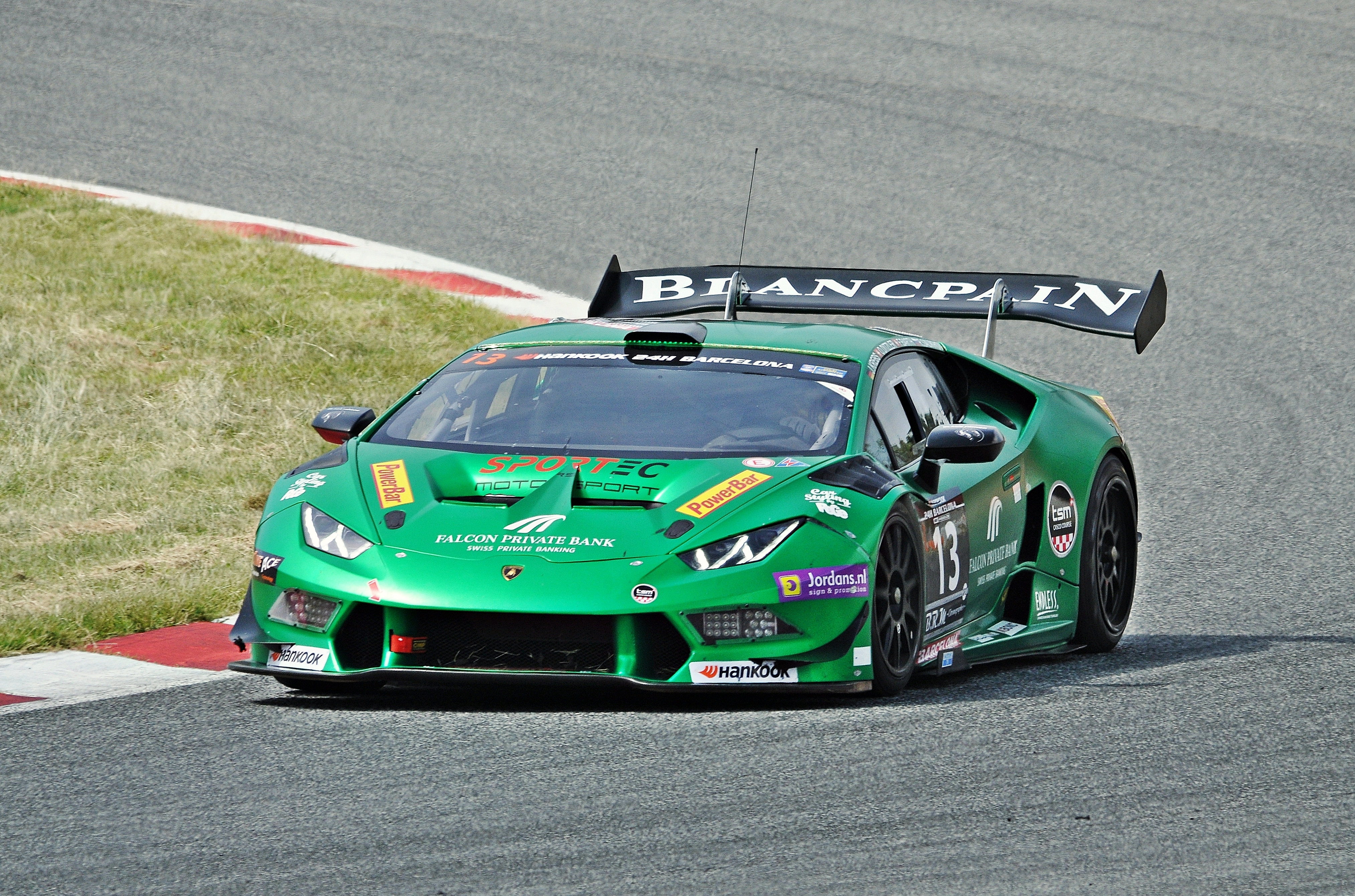 24 horas de Barcelona-circuito de cataluña